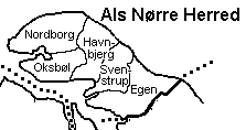 Als Nørre Herred, Sønderborg Amt, Danmark. Tegnet af Svend-Erik Christiansen.